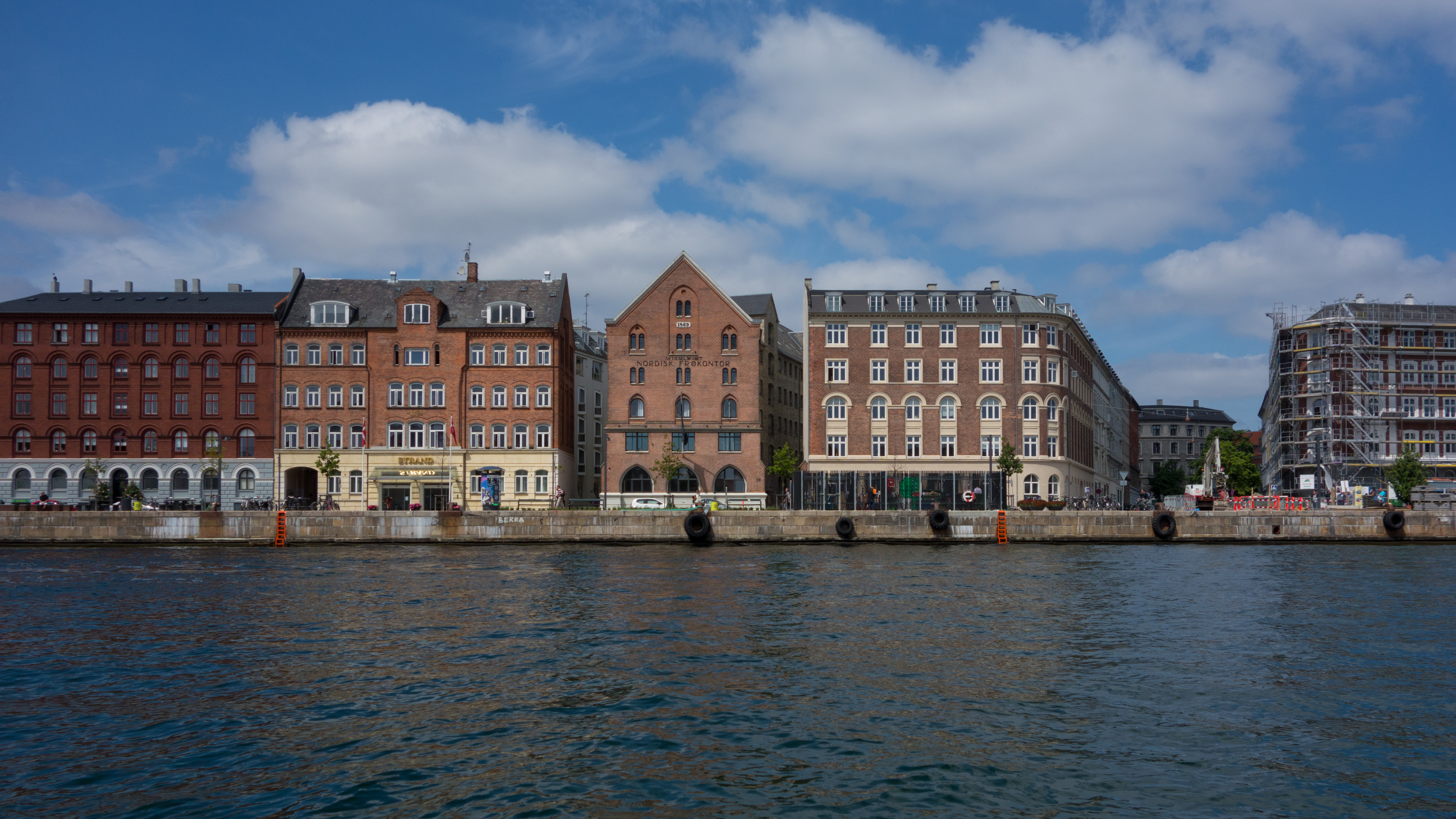 Havnegade in Copenhagen, Denmark